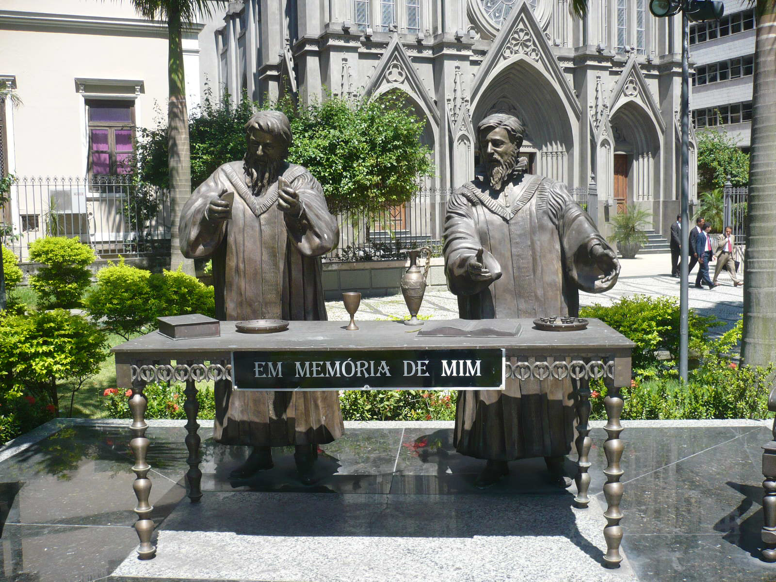 Escultura representativa da Primeira Ceia Protestante nas Américas, localizada na Catedral Presbiteriana do Rio de Janeiro, Brasil.